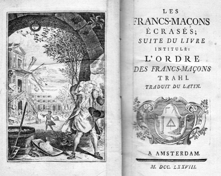 L'ouvrage de Louis Travernol, les Francs-maçons écrasés, paru en 1747 est considéré comme le réel point de départ de l'antimaçonnisme philosophique dans la littérature. Inspiré par le clan ultramontain, une tentative de démonstration de la domination des initiés par le diable y est écrite. L'hédonisme, l'épicurisme naturel et le tolérantisme religieux sont évoqués comme terroirs d'une révolte contre l'Église.